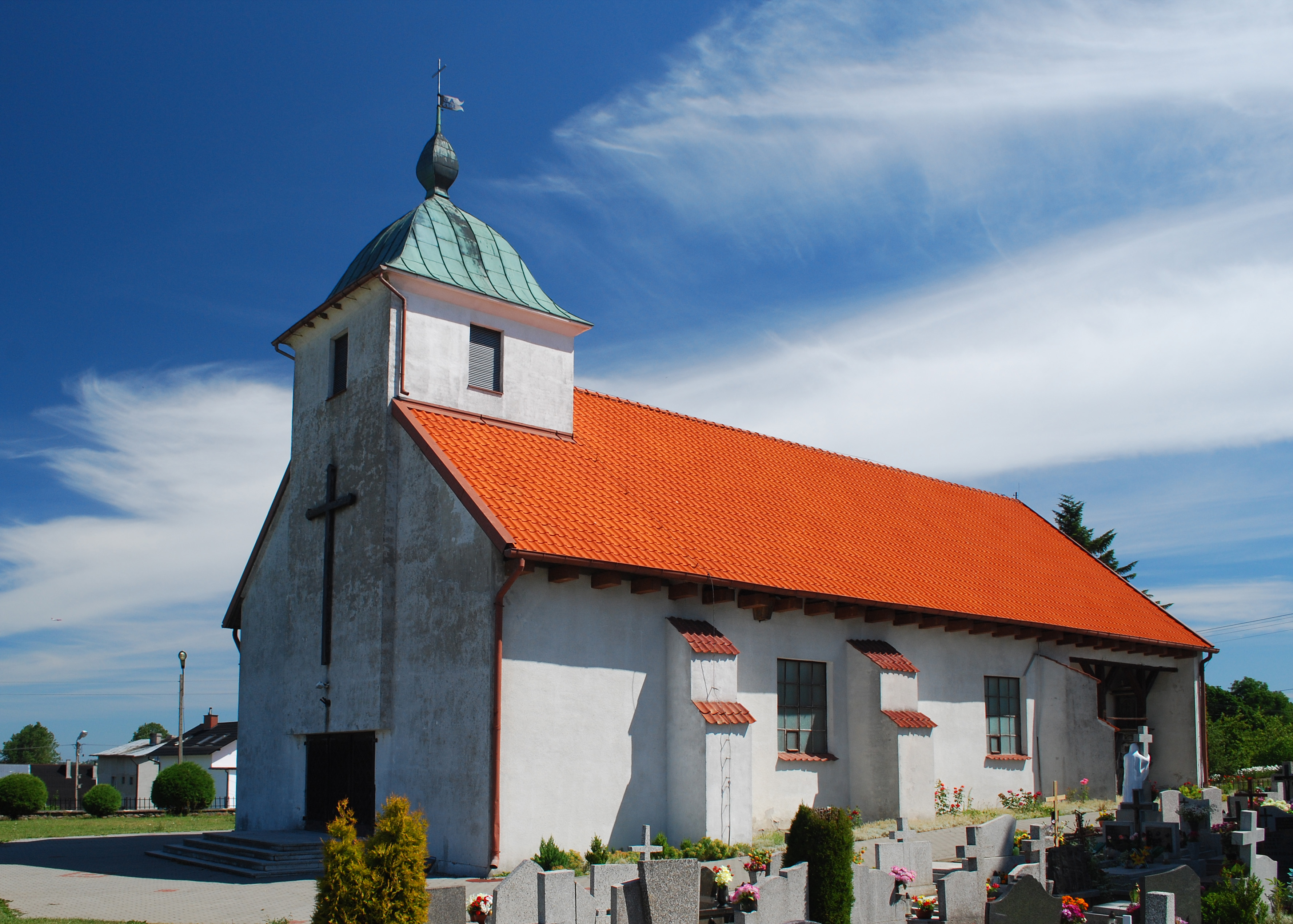 Kościół w Przyjaźni, woj. pomorskie.